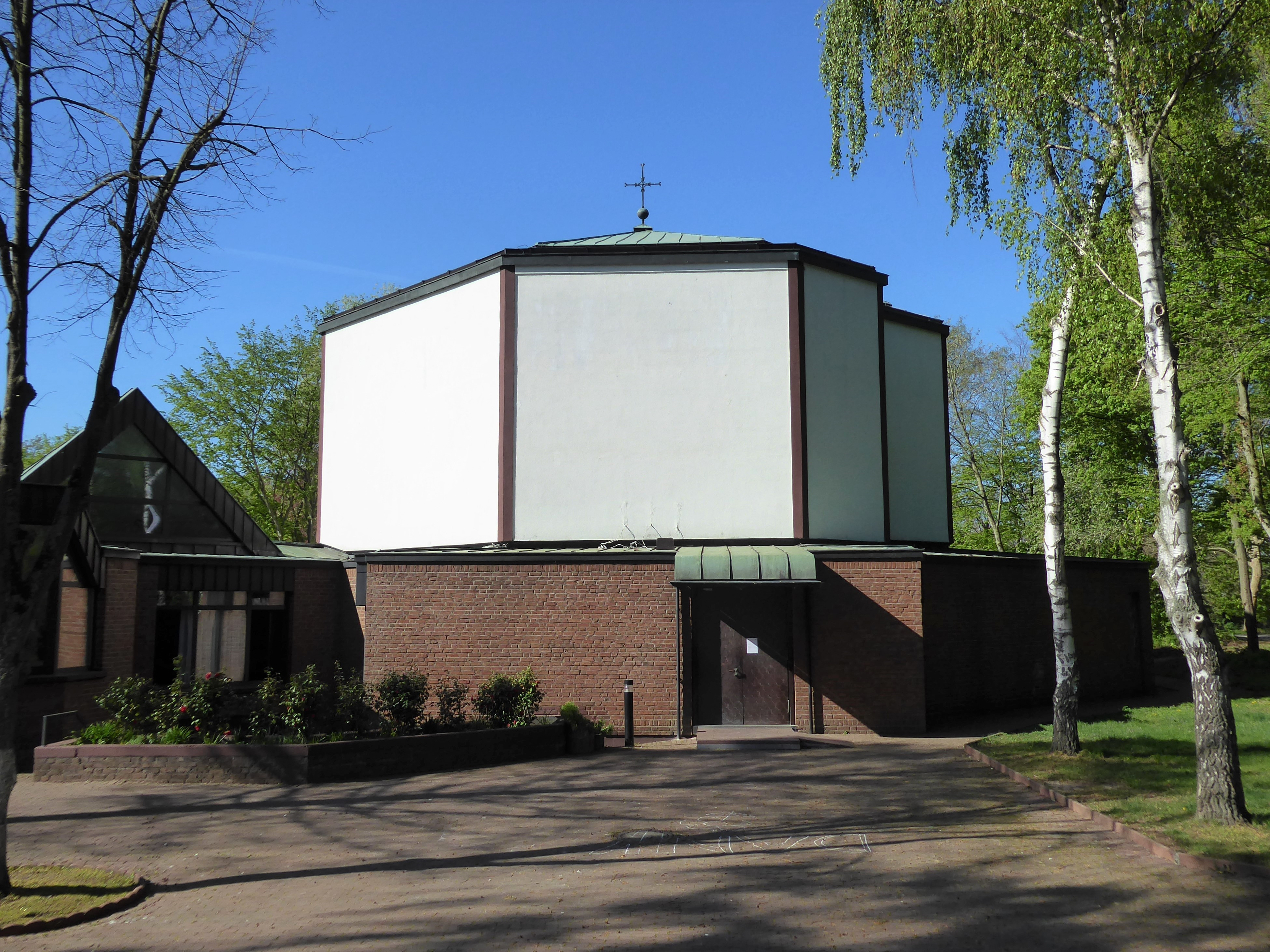 St. Markus / St. Dimitrios (Köln-Seeberg)